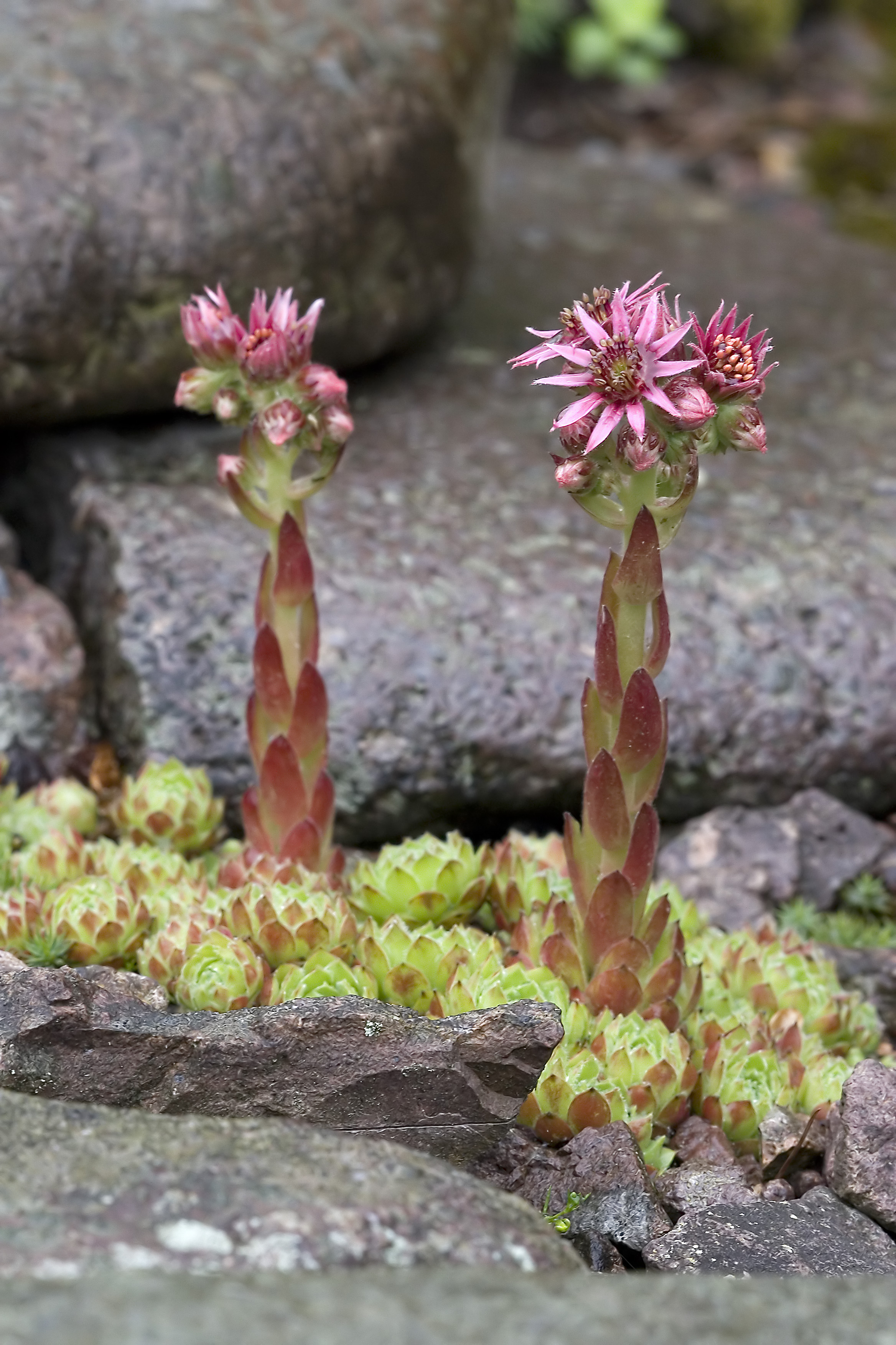 Sempervivum nevadense